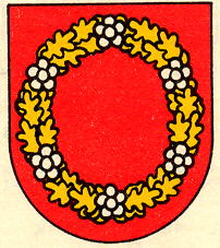 Wappen von Schönengrund Kanton Appenzell Ausserrhoden Schweiz